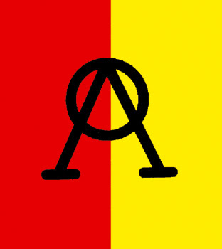 Divisa de la ganadería Florencio Sotomayor: grabado a fuego el hierro familiar que tomase de su padre Eduardo Sotomayor Navarro sobre fondo grana y oro.